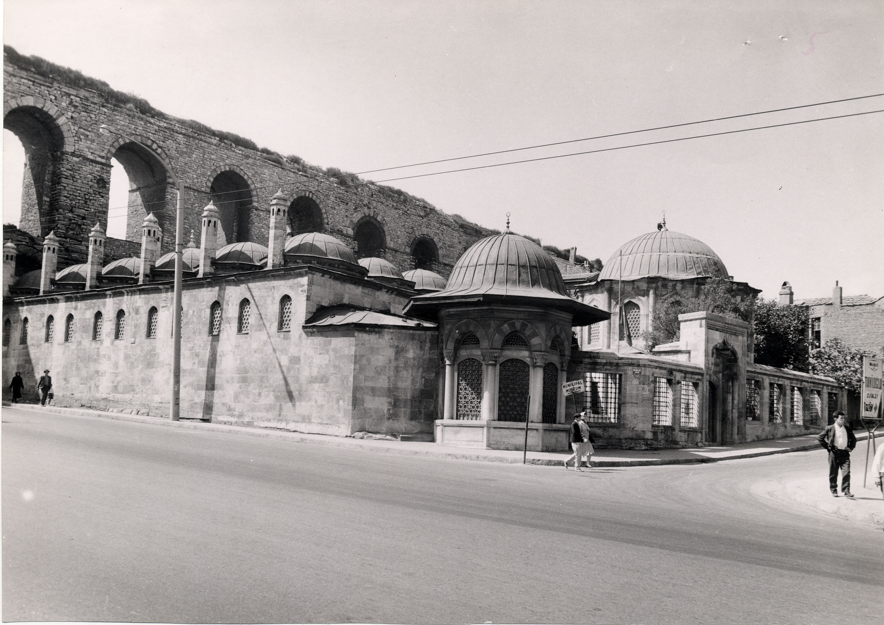 Gazanfer Ağa Madrasa is located between Unkapanı and the Women’s Bazaar, next to the Bozdoğan Aqueduct. It was built by architect Davut Ağa on the order of Gazanfer Ağa, the main custodian of Sultan Mehmed III in the 16th century. The complex, comprised a madrasa, a tomb, a fountain, and a graveyard that was added later. This group of buildings provides an early example of a complex that was designed with a basic architectural program, a popular approach in the 16th and 17th centuries. In 1782 it was partially destroyed by fire and was thereafter renovated a number of times. In 1944 the complex received major restoration and was opened as the Municipality Museum. Since 1989 Gazanfer Ağa Madrasa has been used as the Museum of Caricature and Humor. SALT Research, Photography Archive SALT Research, Ali Saim Ülgen Archive Gazanfer Ağa Medresesi, Unkapanı ile Kadınlar Pazarı arasında, Bozdoğan Kemeri’nin yanında konumlanır. 16. yüzyılda, Davut Ağa’nın mimarbaşı olduğu dönemde, Sultan III. Mehmed’in has odabaşısı Gazanfer Ağa tarafından yaptırıldı. Medrese, türbe ve sebilden oluşan külliyeye daha sonra küçük bir hazire eklendi. Bu yapı topluluğu, 16. ve 17. yüzyılda görülen, mimari programları daraltılmış medrese ağırlıklı külliyelerin erken örneklerindendir. 1782’deki bir yangında tahrip olan külliye çeşitli onarımlar geçirdi. 1944’te yenilenerek Belediye Müzesi olarak kullanılmaya başlanan yapı topluluğu, 1989’dan bu yana Karikatür ve Mizah Müzesi olarak hizmet vermektedir. SALT Araştırma, Fotoğraf Arşivi SALT Araştırma, Ali Saim Ülgen Arşivi